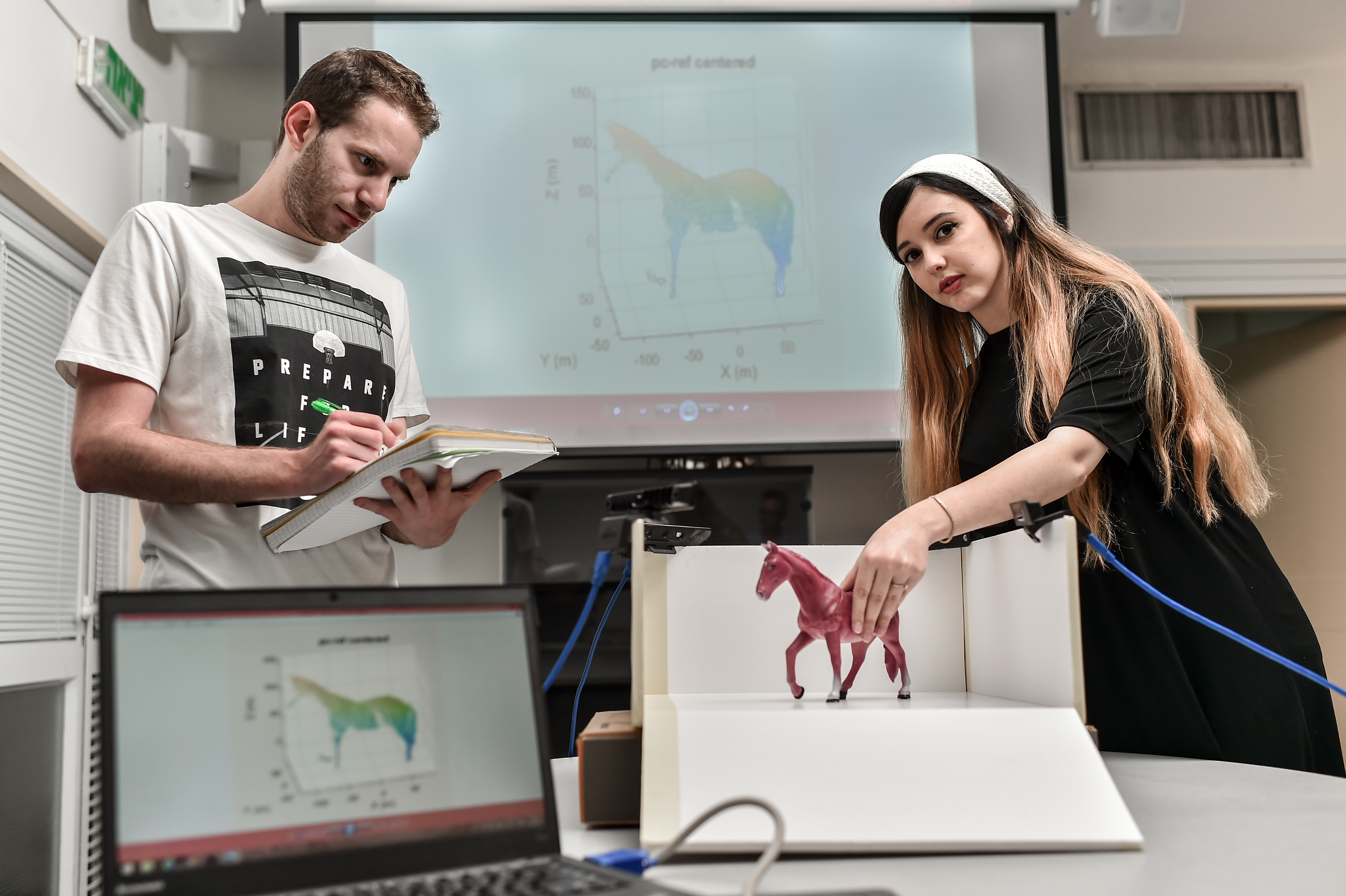 רובוטיקה, מחשבים, עיבוד אותות, בינה מלאכותית, פוטוניקה, אלקטרומגנטיקה הם רק חלק ממגוון שטחי הלימוד והמחקר בפקולטה להנדסת חשמל בטכניון